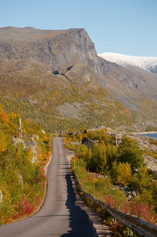 Efter vägen från Ritsem, sydöst mot Stora sjöfallet. Laponia världsarv. Motiv: Akkajaure Nyckelord: Riksintressen, Världsarv Kategori: Fjällmiljö, Vägar Efter vägen från Ritsem, sydöst mot Stora sjöfallet. Laponia världsarv.